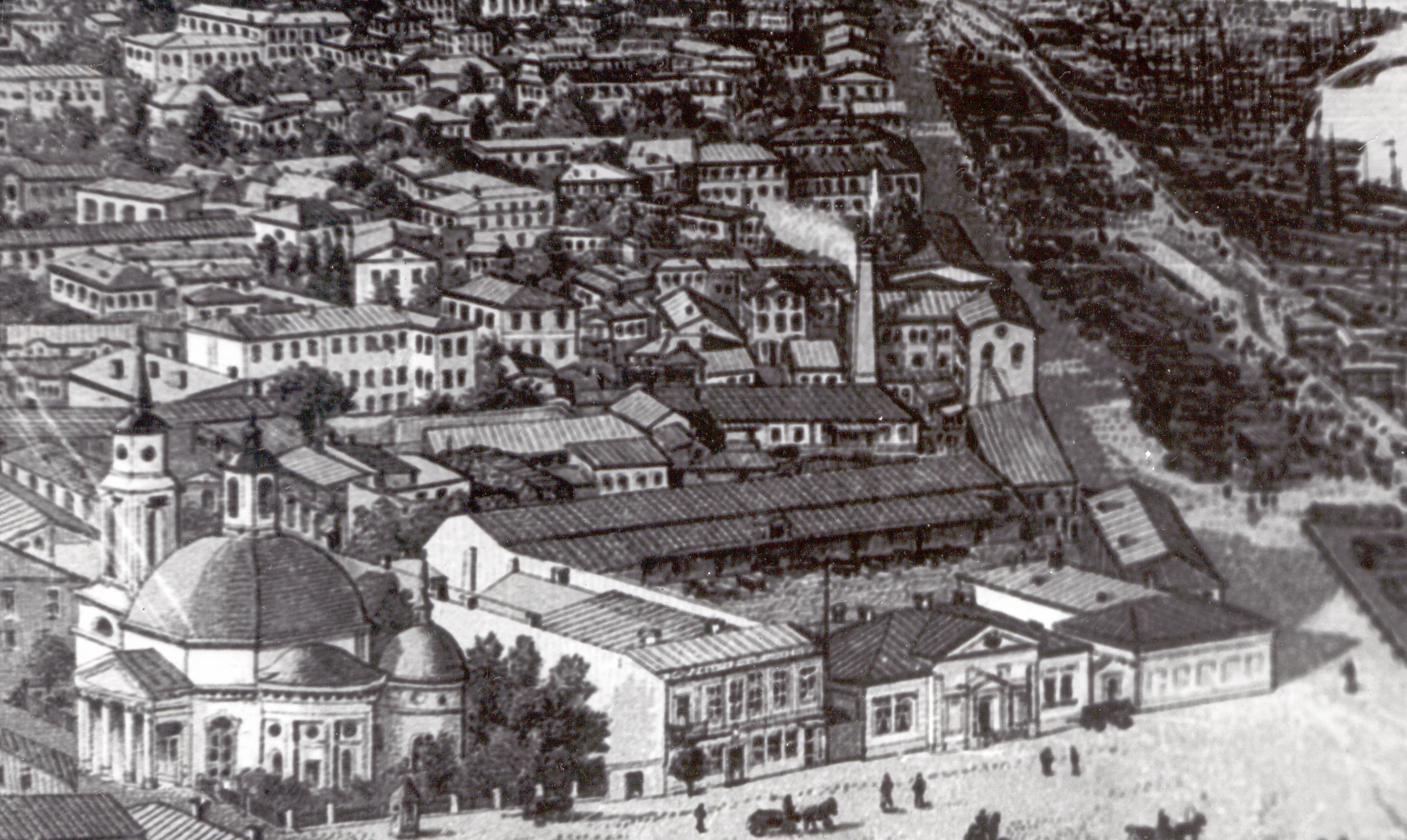 Kiev, Podol